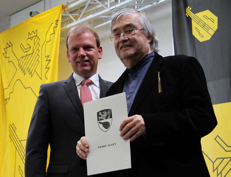 Christoph Burkhard, Bürgermeister der Stadt Alzey und Preisträger Peter Härtling bei der 10. Verleihung des Elisabeth-Langgässer-Literaturpreises der Stadt Alzey an Peter Härtling am 28. Februar 2015